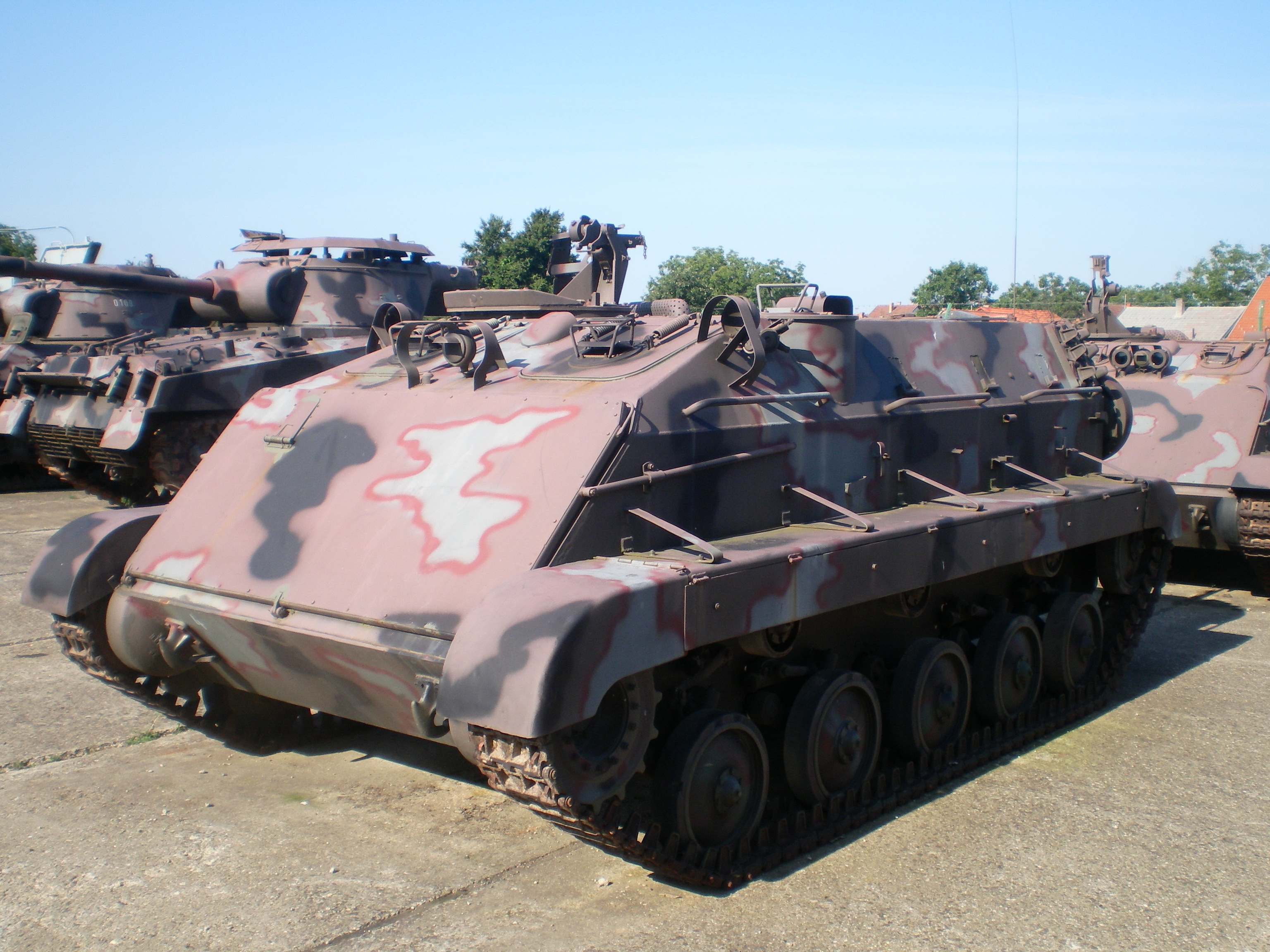 Югославский БТР М-60, захваченный хорватскими солдатами в годы войны. В настоящее время выставлен в качестве экспоната в казарме города Вуковара.